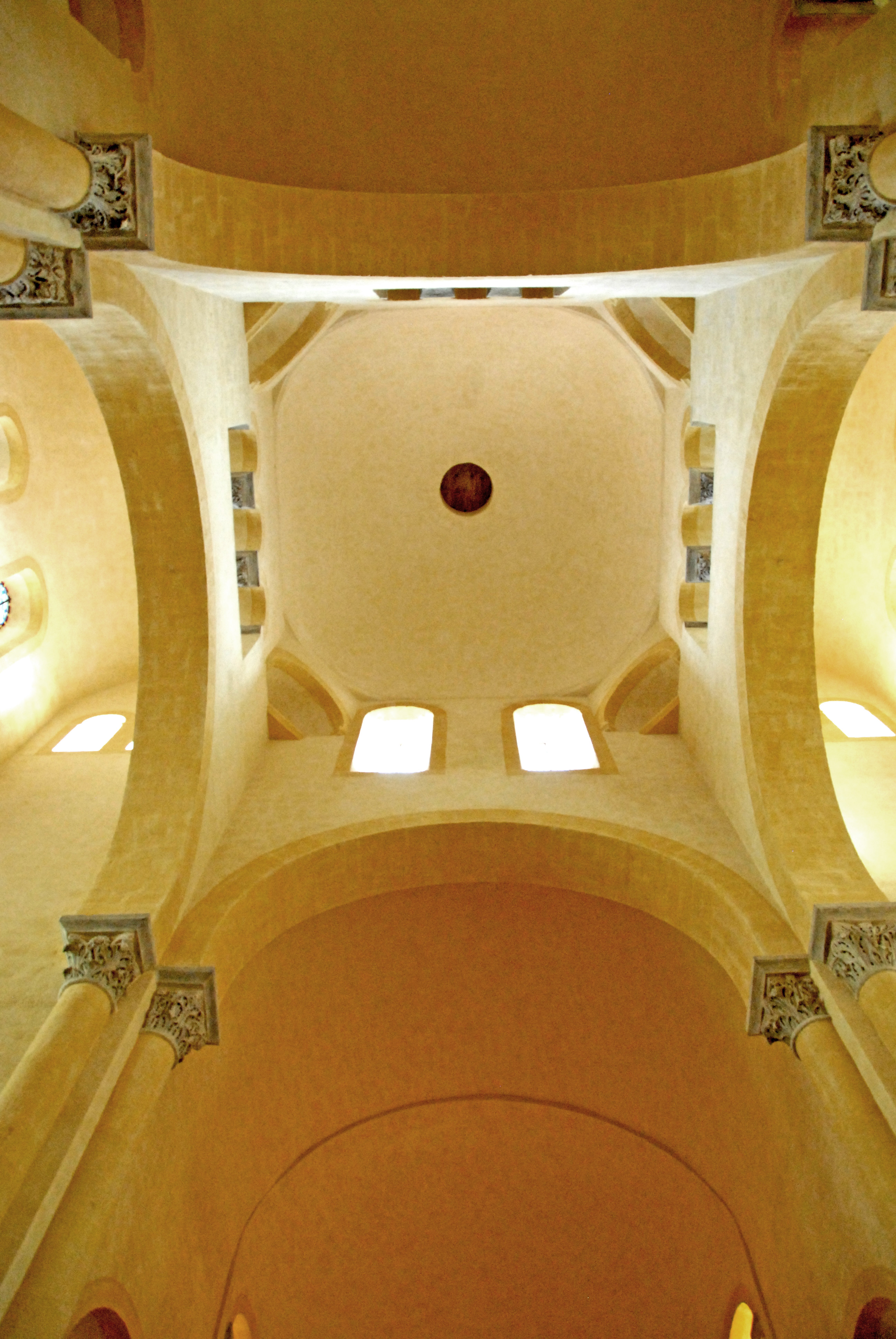 Notre-Dame du Port, Vierungskuppel